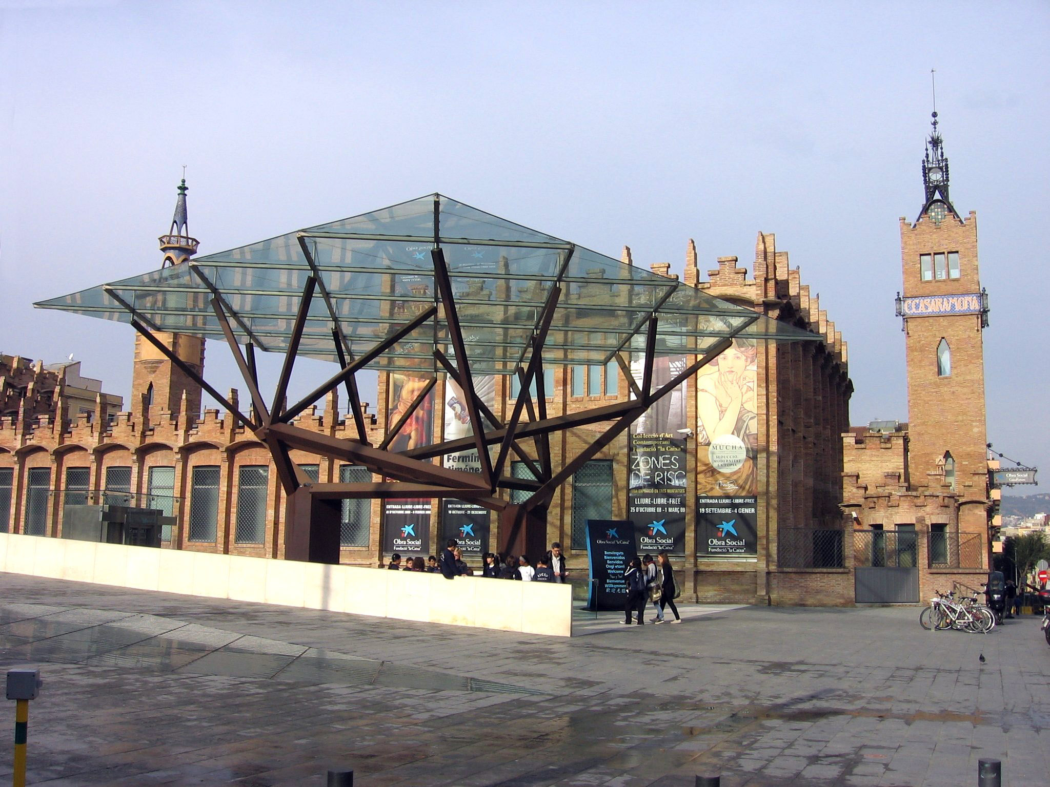 Árboles gemelos (2001), de Arata Isozaki, CaixaForum de Montjuïc.